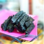 家乡特产——切好的豆豉果